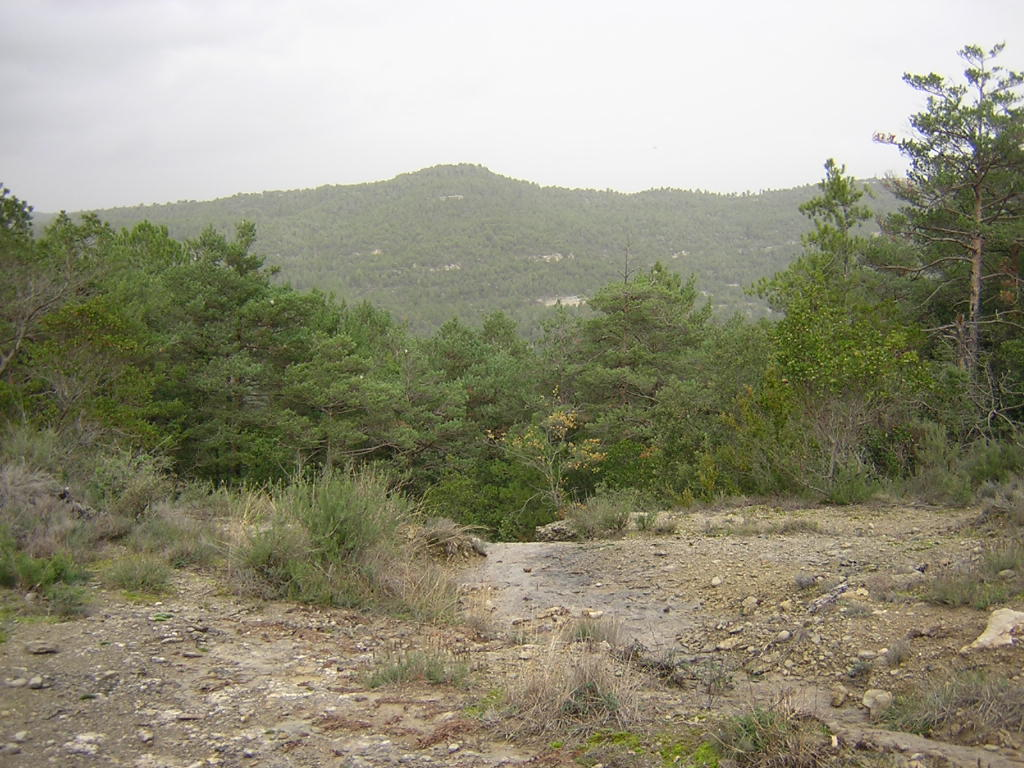 El Serrat de Baiones des de Colljovà (Monistrol de Calders, Moianès)